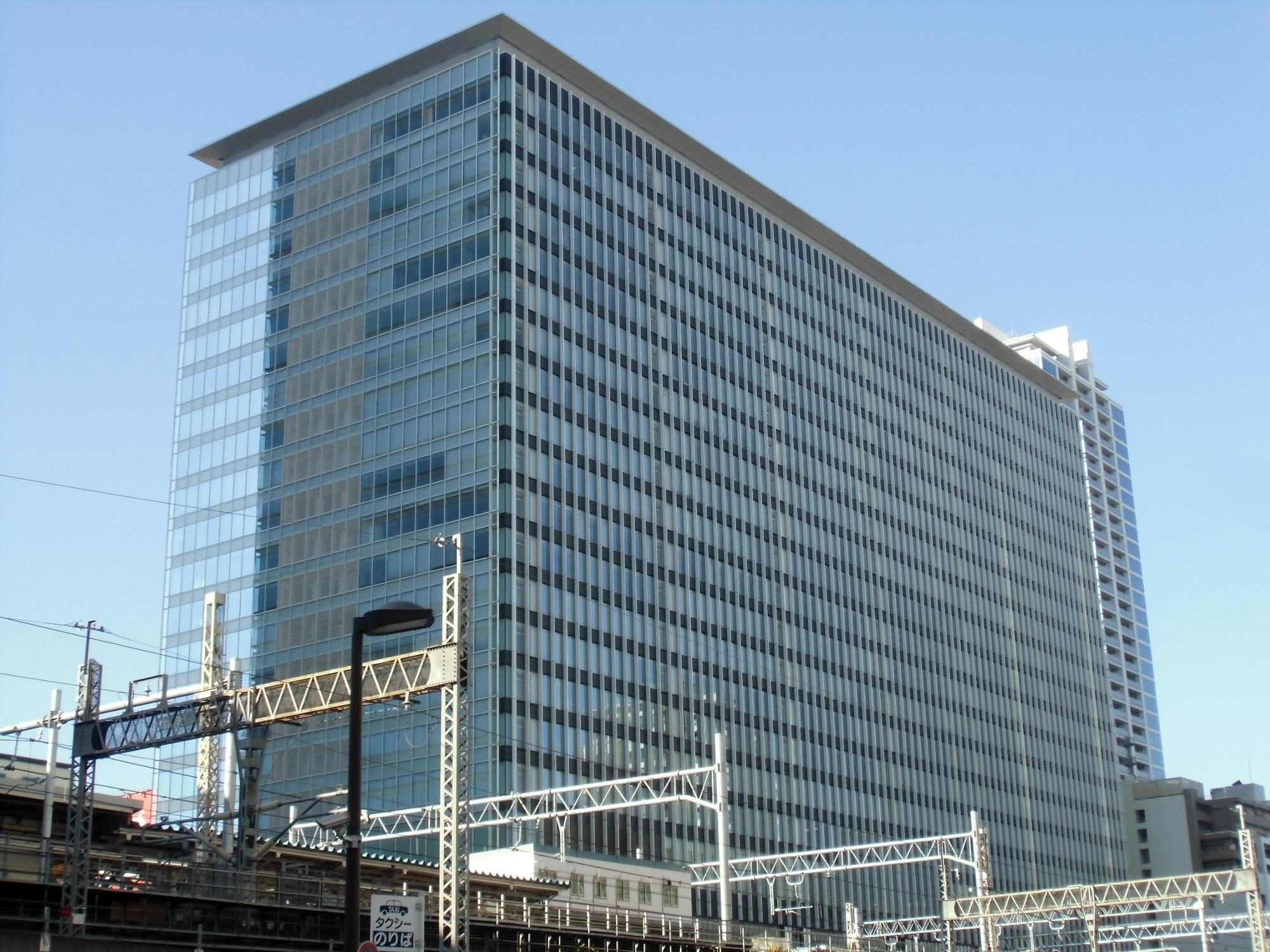 秋葉原UDX全景（2013年11月撮影）